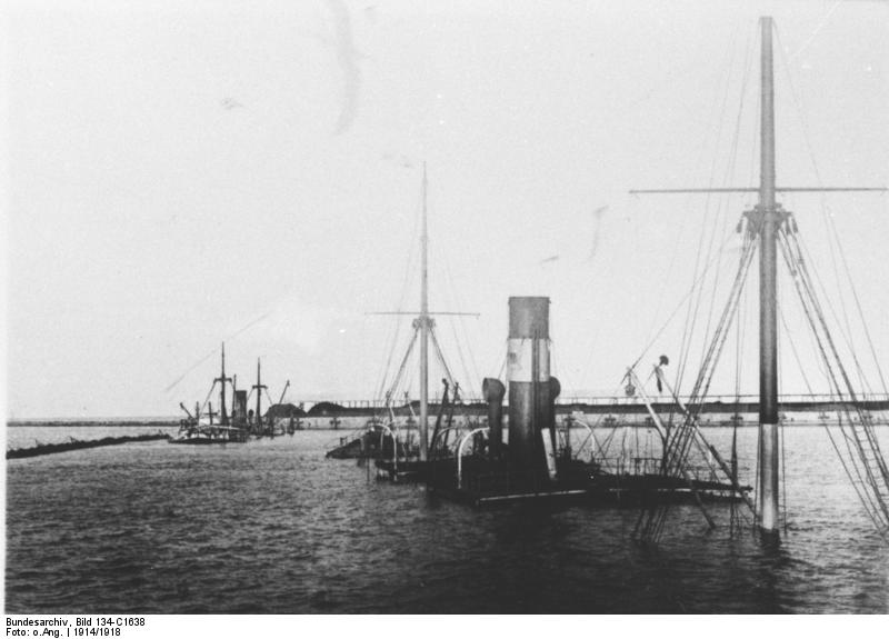 Schutzgebiet Kiautschou 1. Weltkrieg Versenkte Dampfer im Hafen von Tsingtau